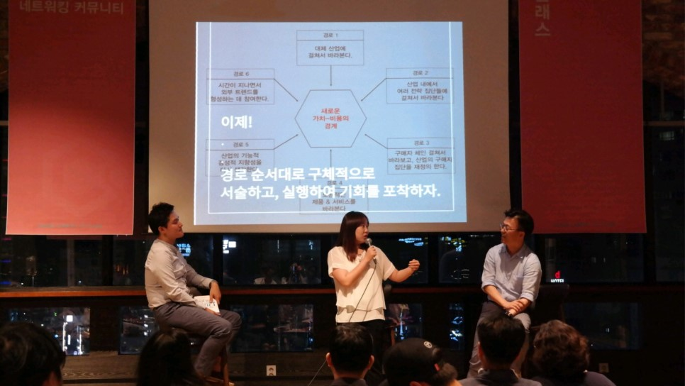 CC클래스의 인톡북톡 시간에 회원들과 북톡을 나누고 있다.